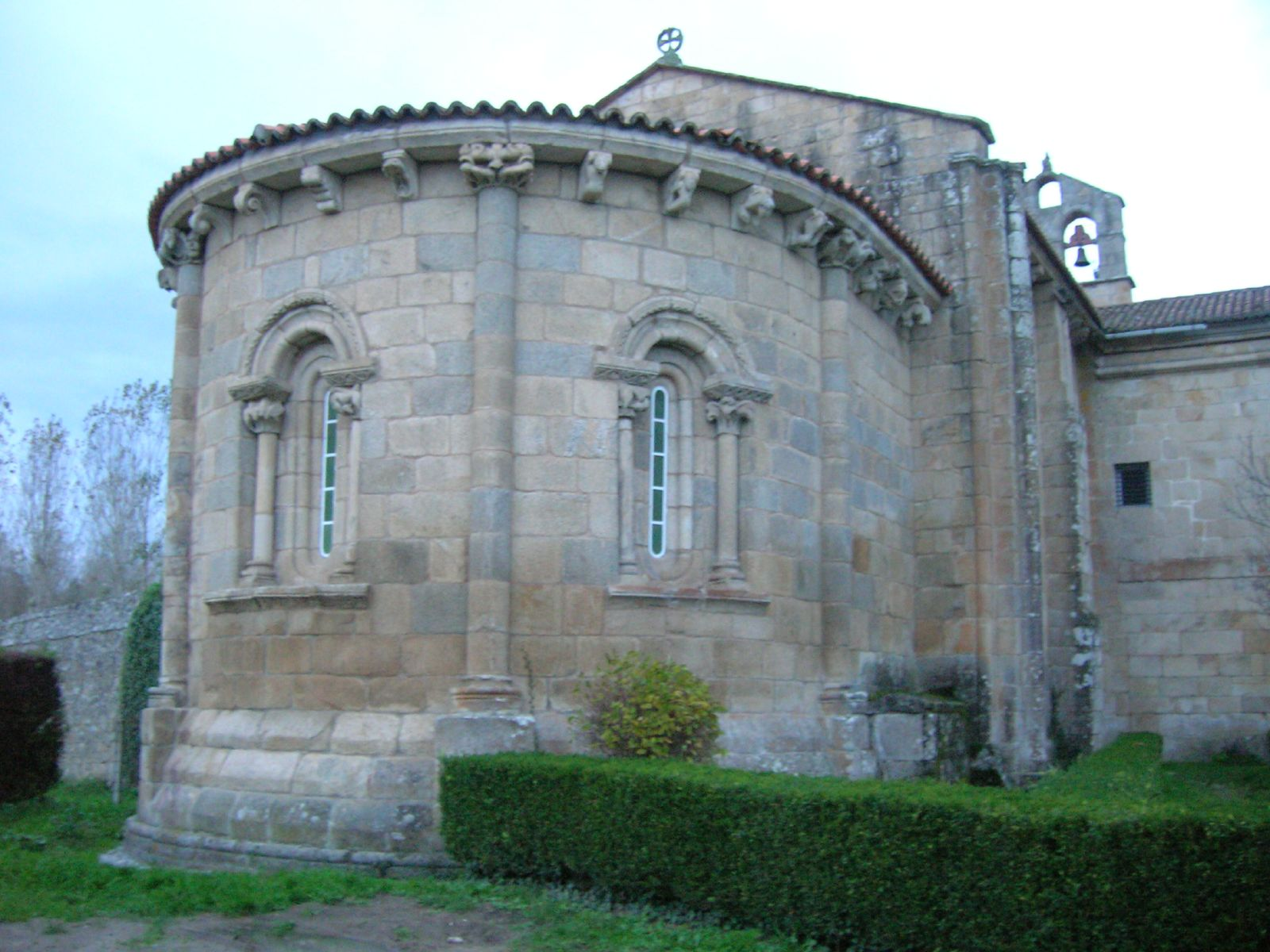 Cabecera románica de la iglesia.